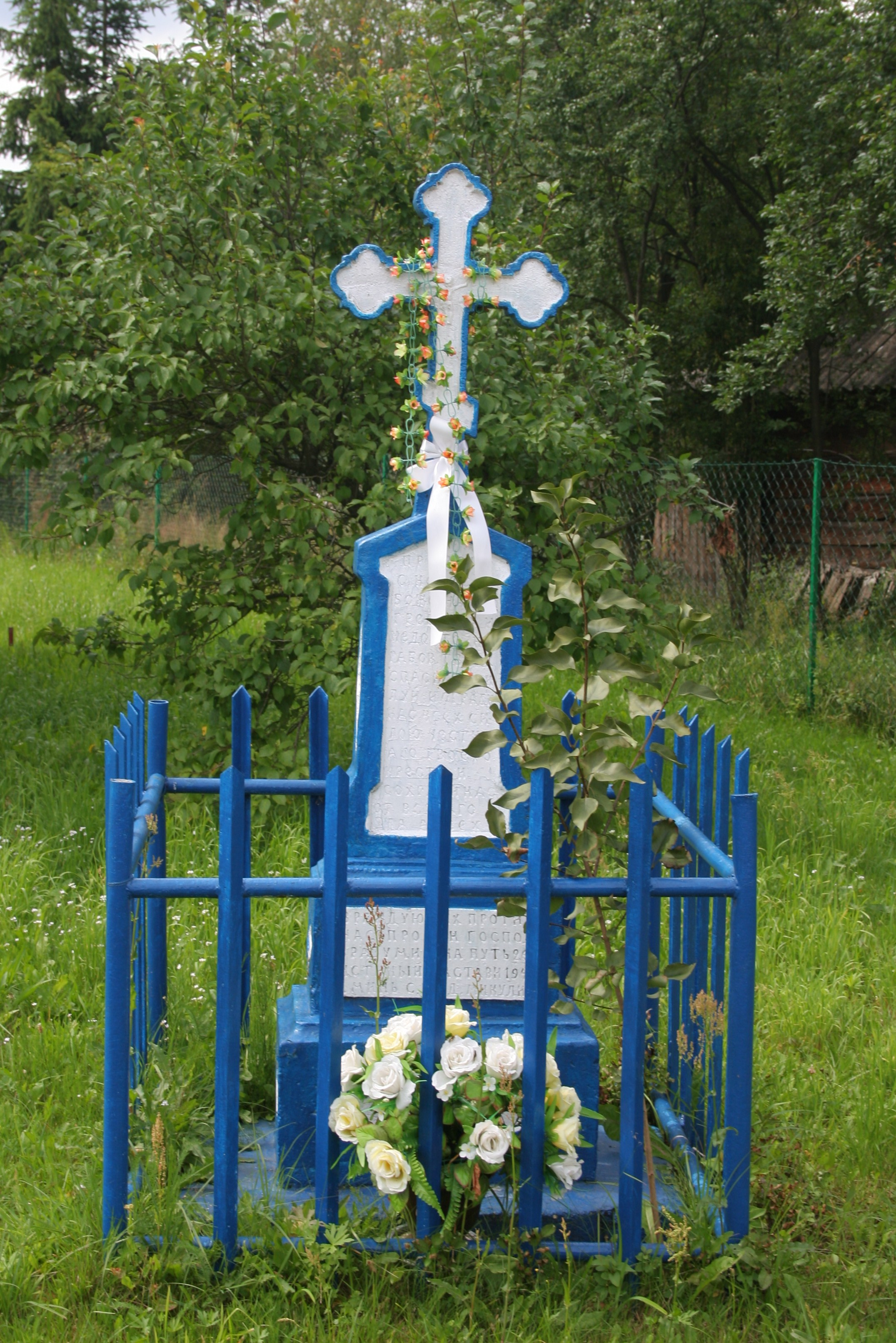 Krzyż przydrożny w Mikuliczach.